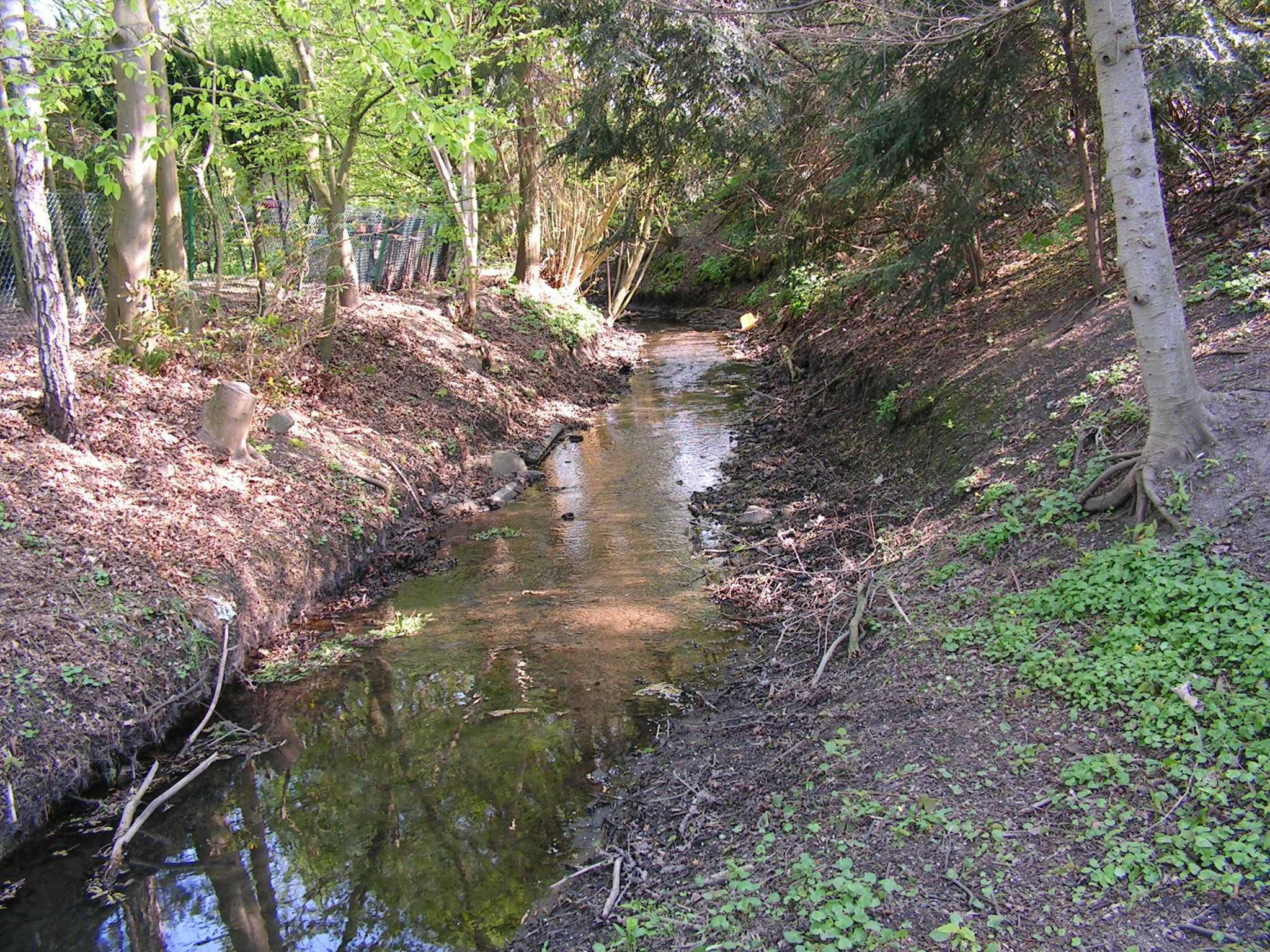 Fackenburger Landgraben / Grenze zwischen Lübeck und Stockelsdorf